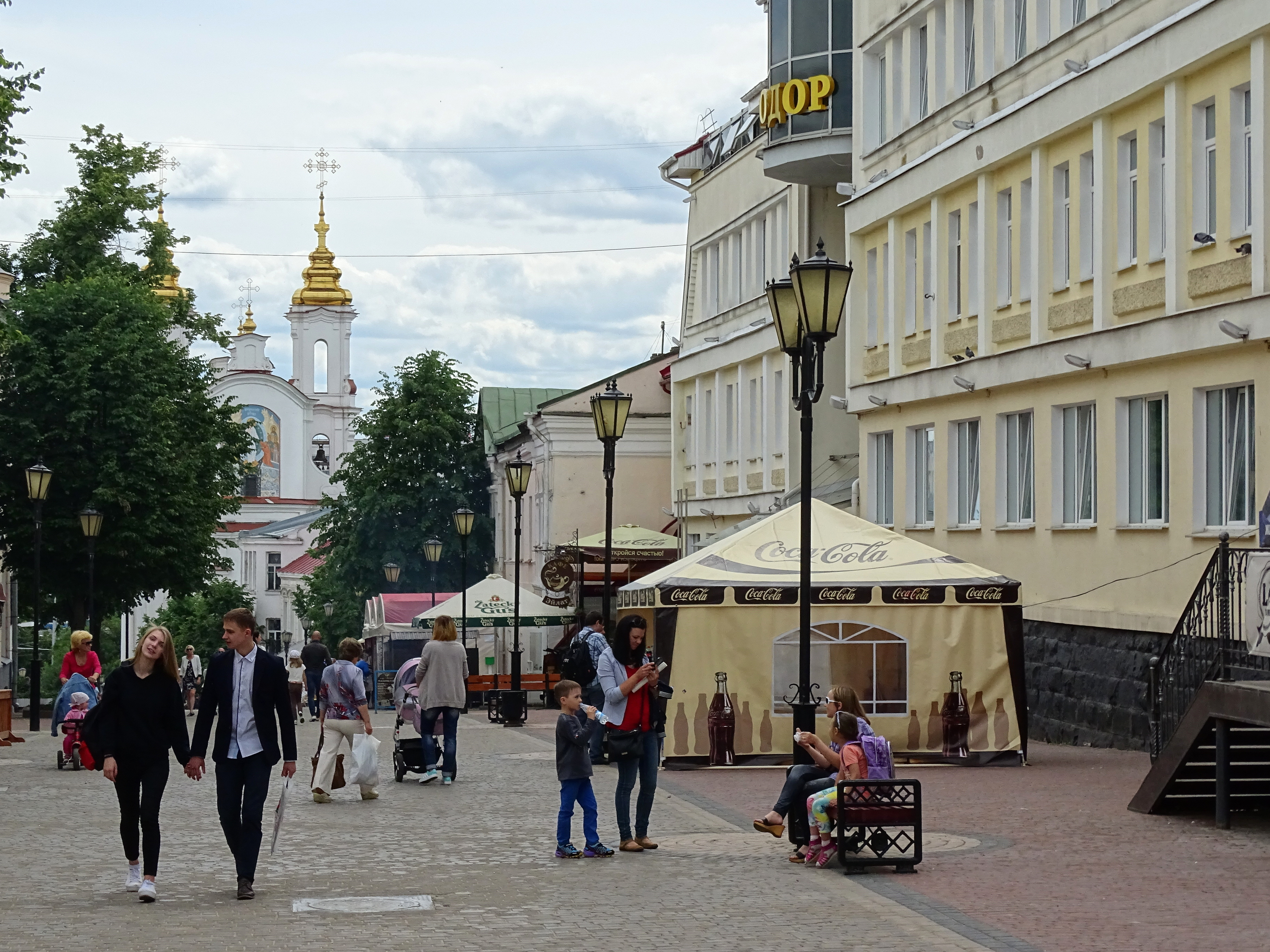 Scene along Suvarova Street - Vitebsk - Belarus